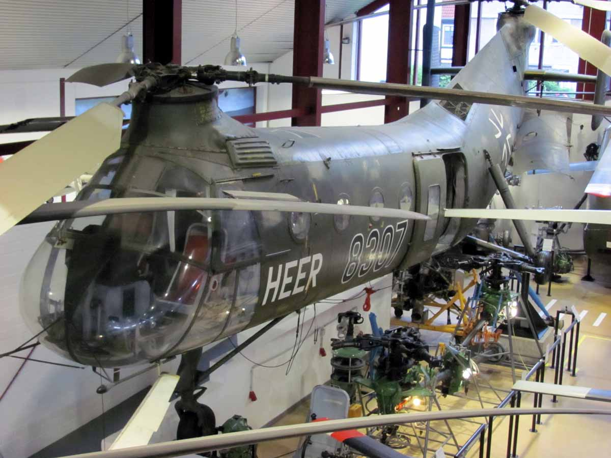 Vertol H-21, fotografiert im Hubschraubermuseum Bückeburg